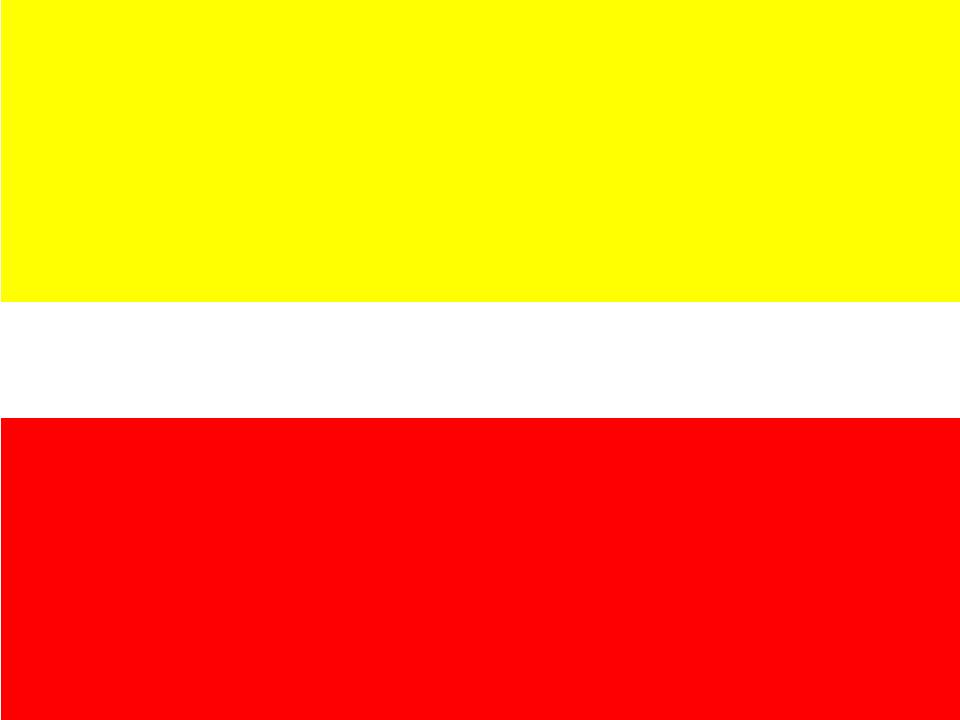 Balisage d'un sentier de grande randonnée de pays.